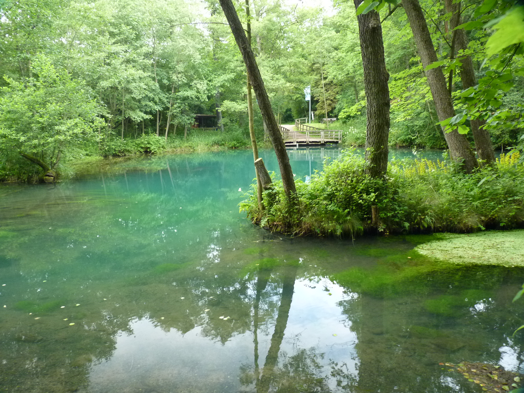 Blick auf den Hauptquelltopf der Rhumequelle im Jahr 2014